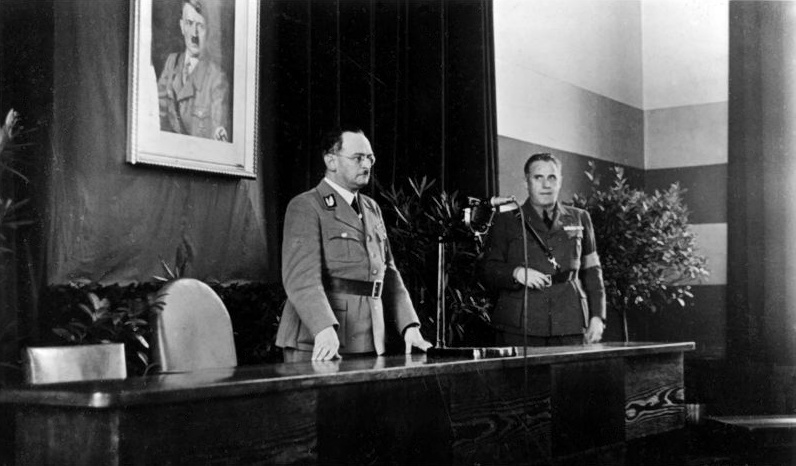 Staatsbesuch des Reichs und Preußischen Ministers des Innern Dr. Wilhelm Frick in Sudetenland